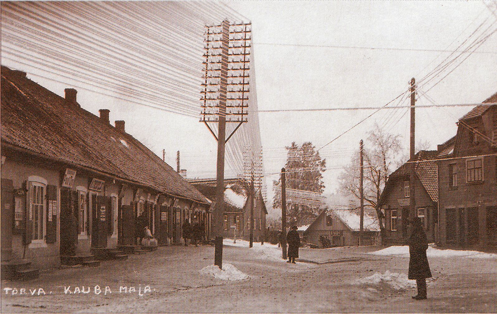 Tõrva linn umbes 1928. aastal. Foto on ilmunud Hillar-Jüri Villemsoni raamatus "Tõrva vanadel fotodel"(2006)